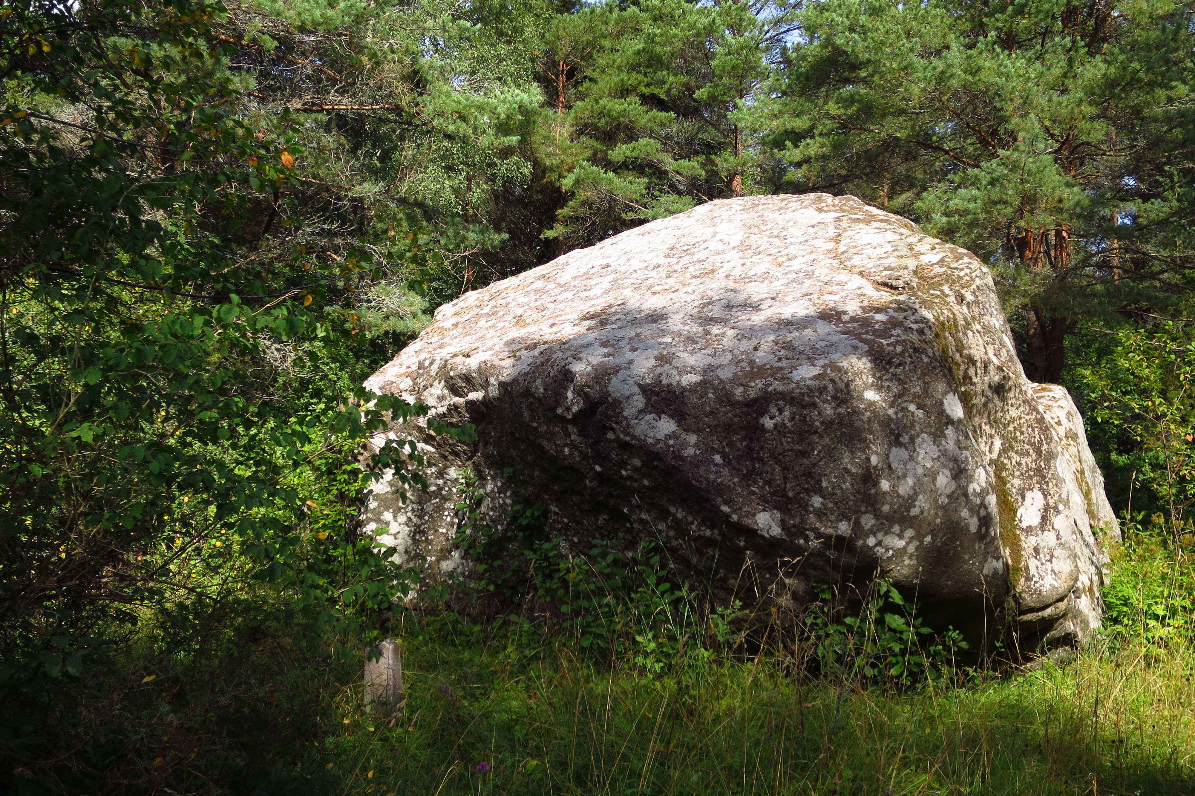 Hiiesaare Silmakivi Hiiumaal